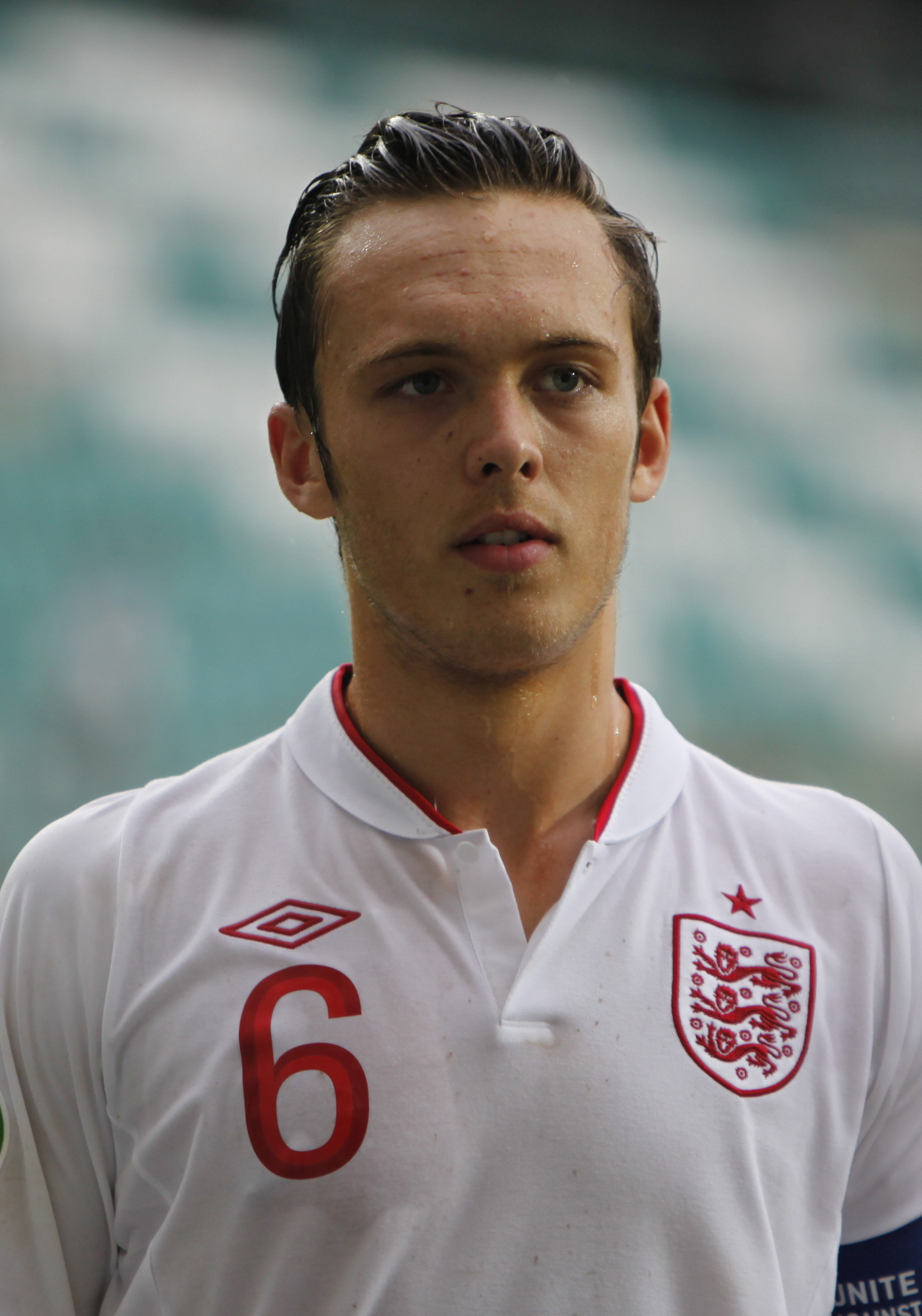 Thomas Thorpe en 2012